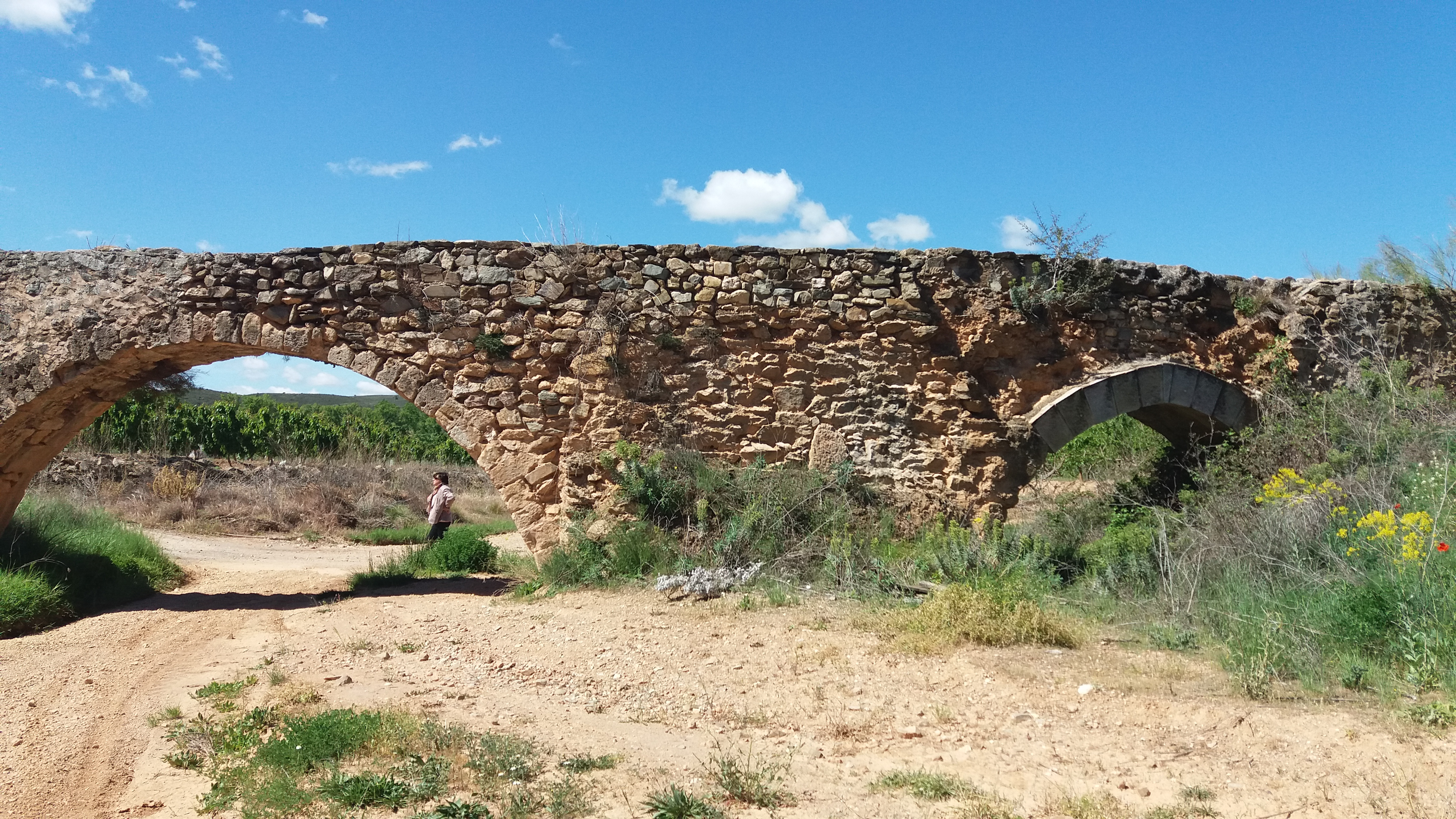 Acueducto de origen musulmán en Ateca